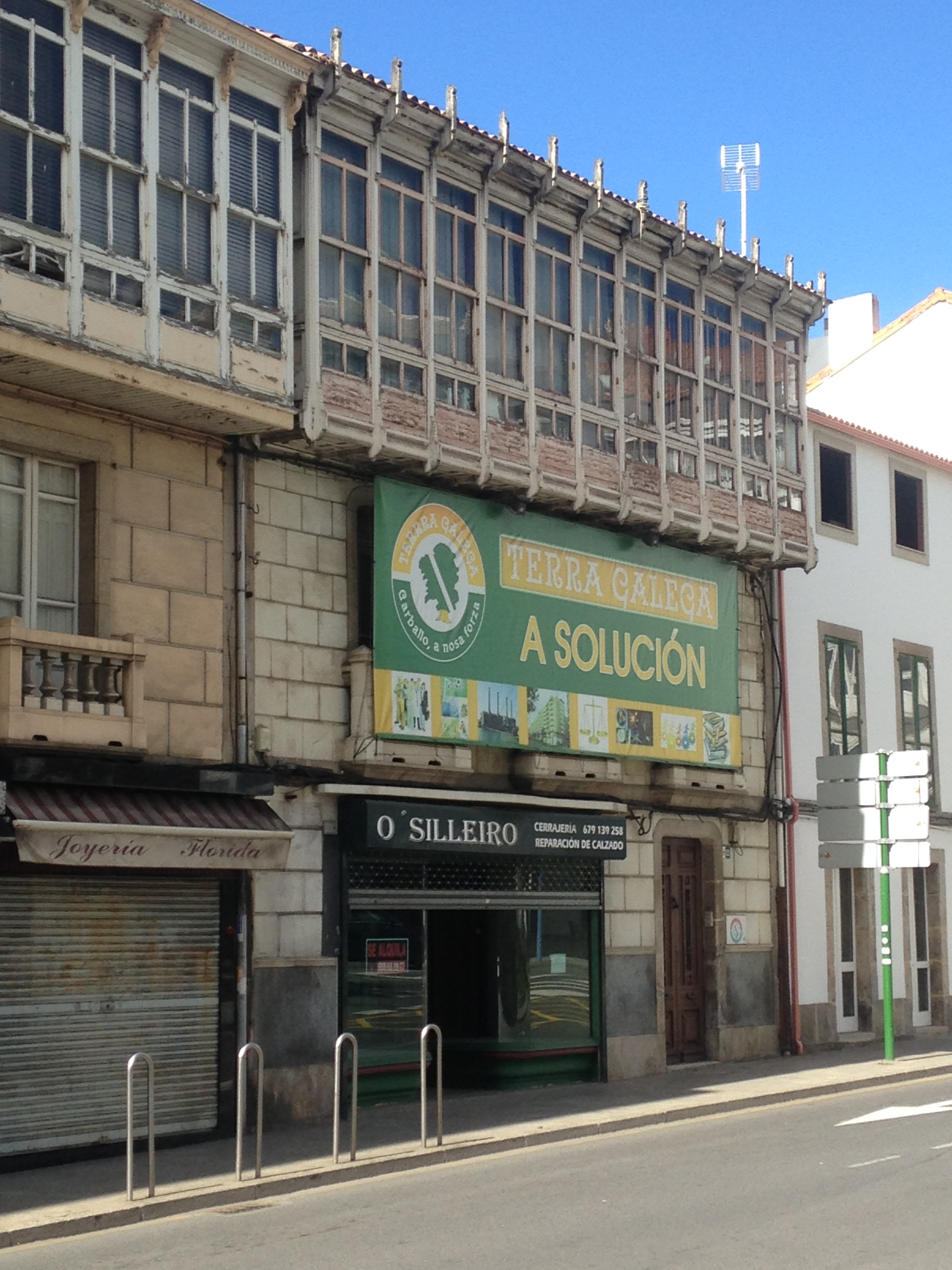 Sede de Terra Galega en Carballo na Praza de Galicia.